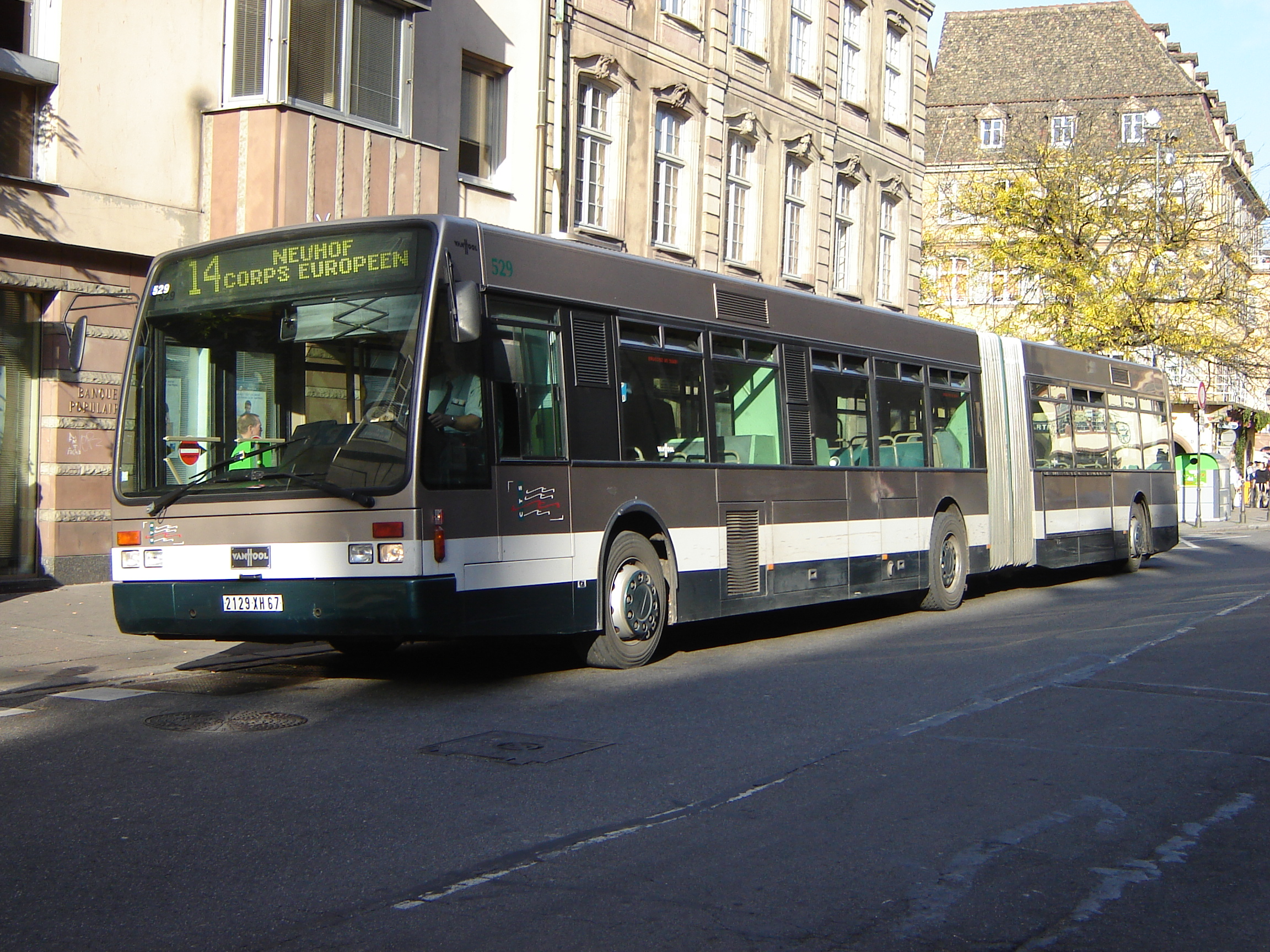 Un AG 300 de la CTS à Ancienne Douane, Strasbourg.